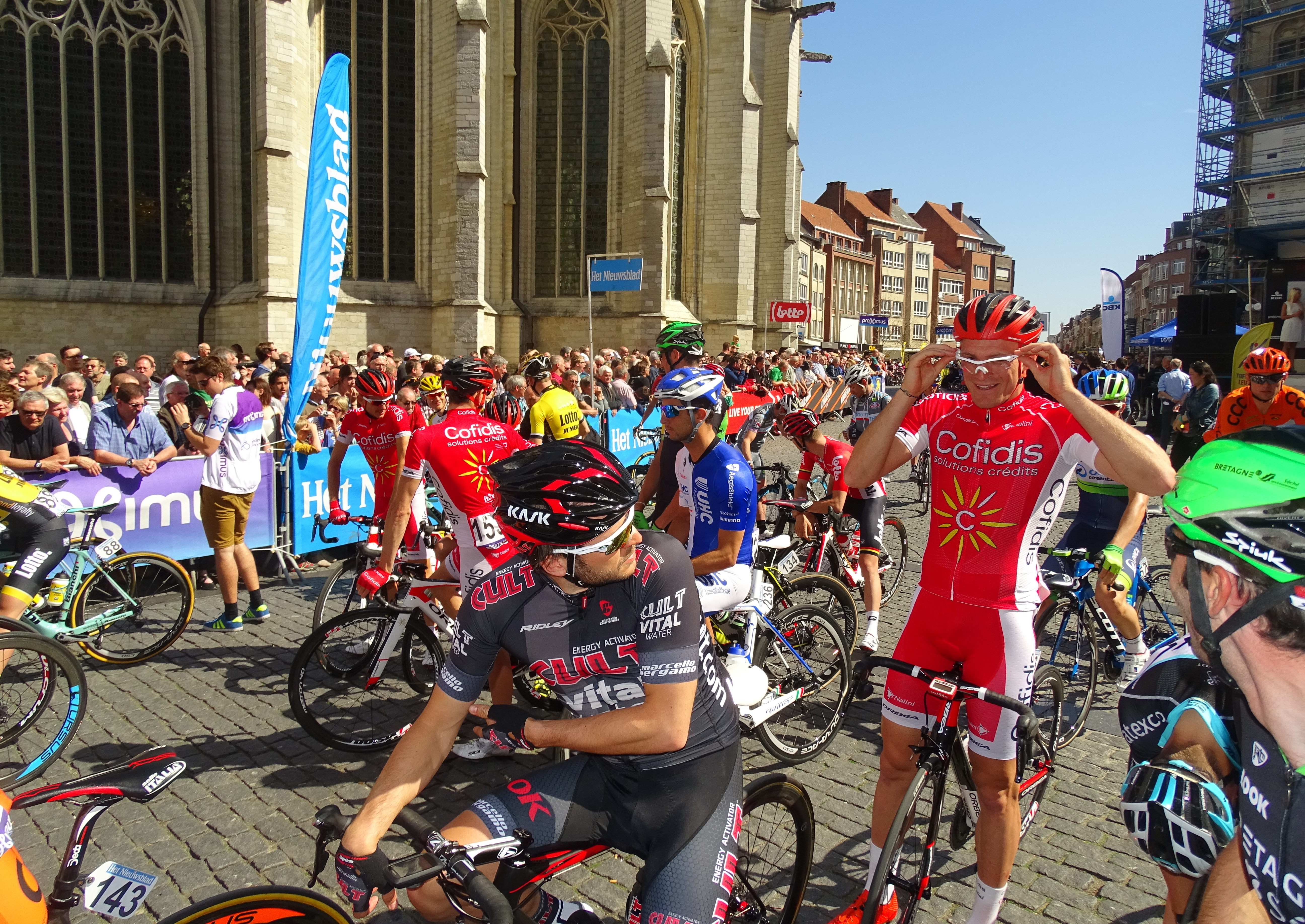 Reportage réalisé le mercredi 15 avril à l'occasion du départ de la Flèche brabançonne 2015 à Louvain, Belgique.